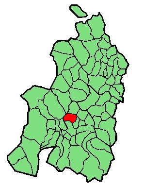 aipaturiko udalerriaren kokapena Nafarroa Beherean